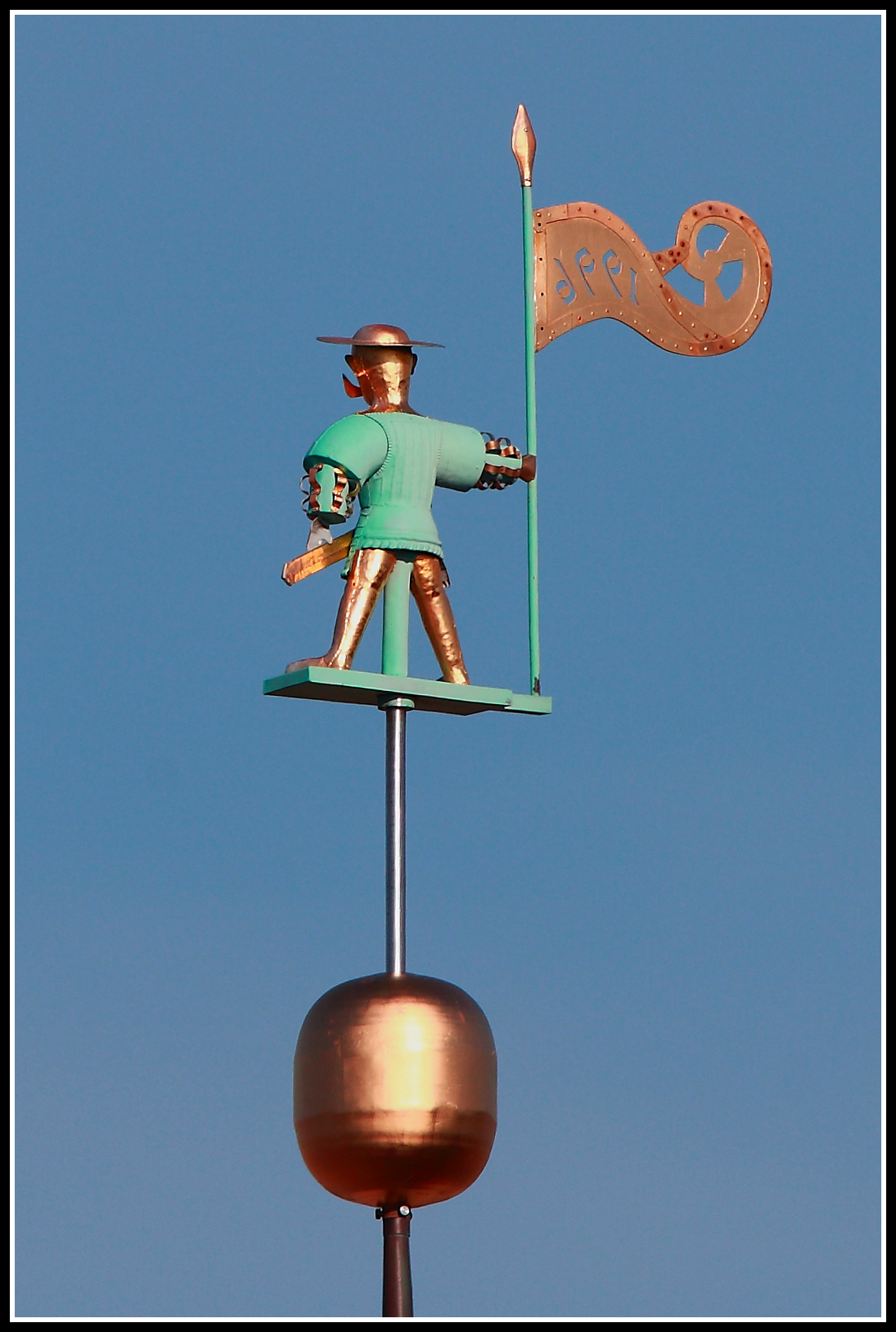 Vana Toomas 09